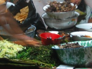 Nasi Pecel YU SRI Simpang Lima Semarang